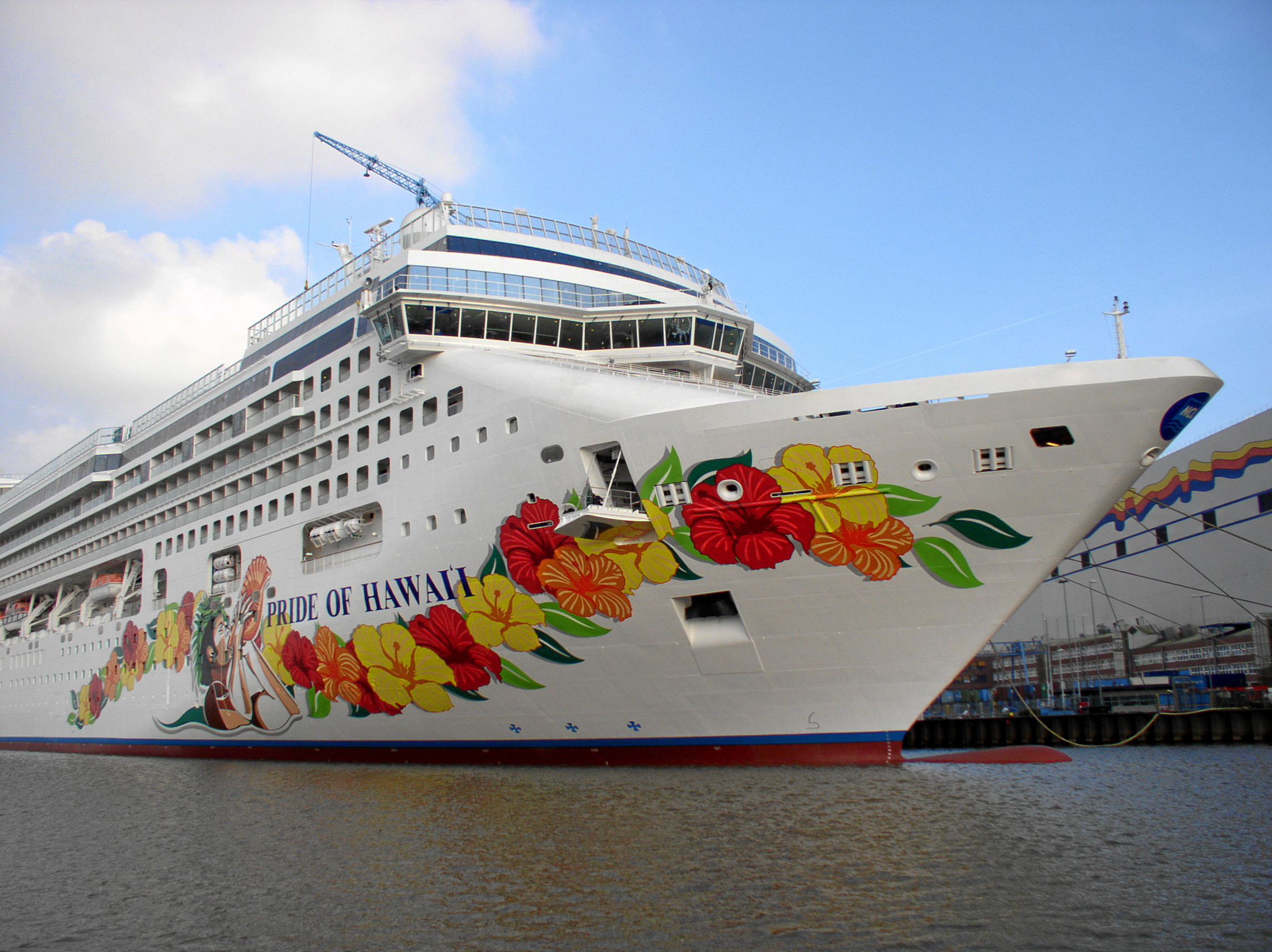 Die Pride of Hawaii am Tag der Ausdockung vor der Meyerwerft in Papenburg Quelle: selbst fotografiert am 19. Feb. 2006 Fotograf: H.H. Schoe